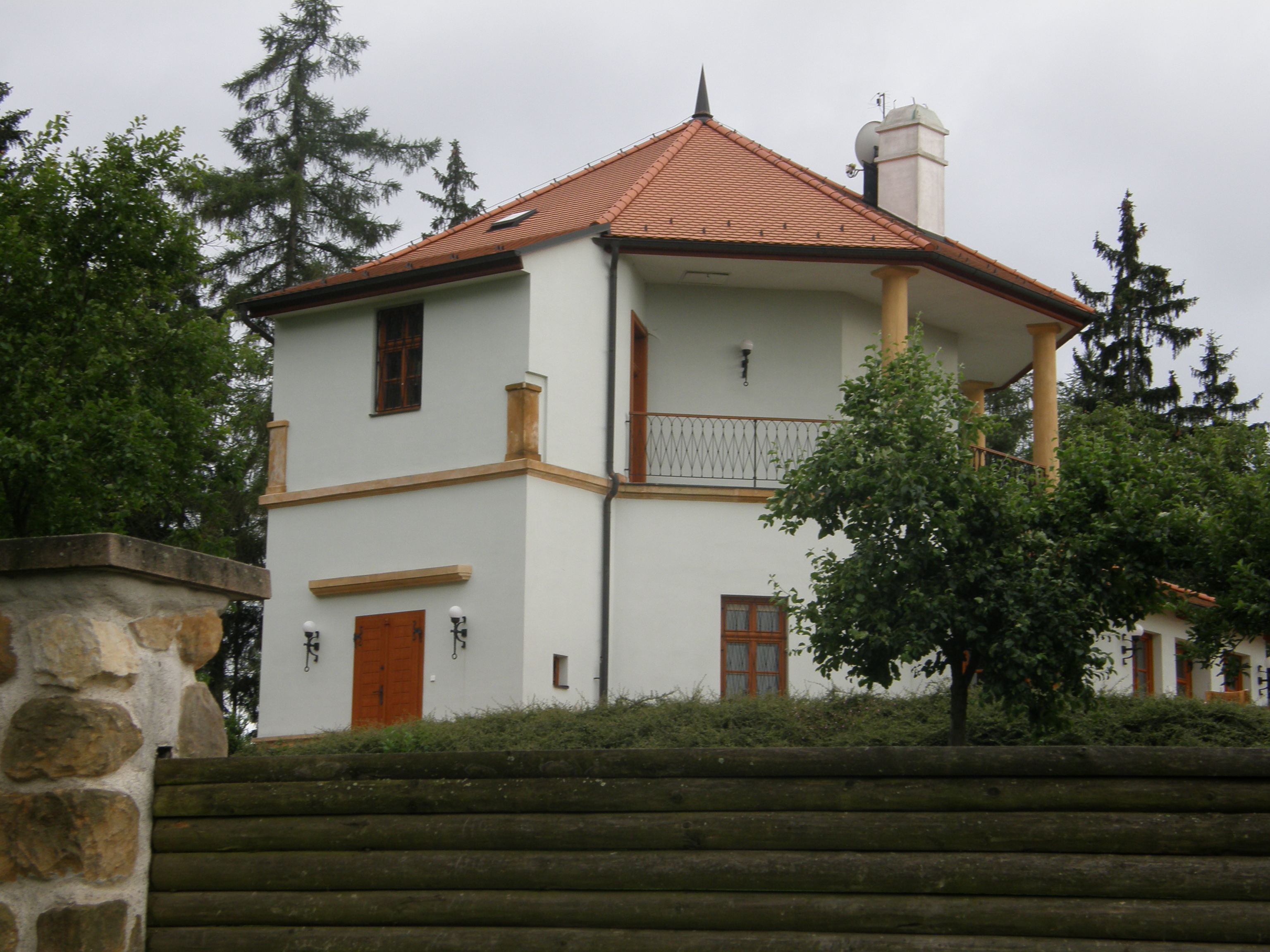 Zámek Lhota Rapotina